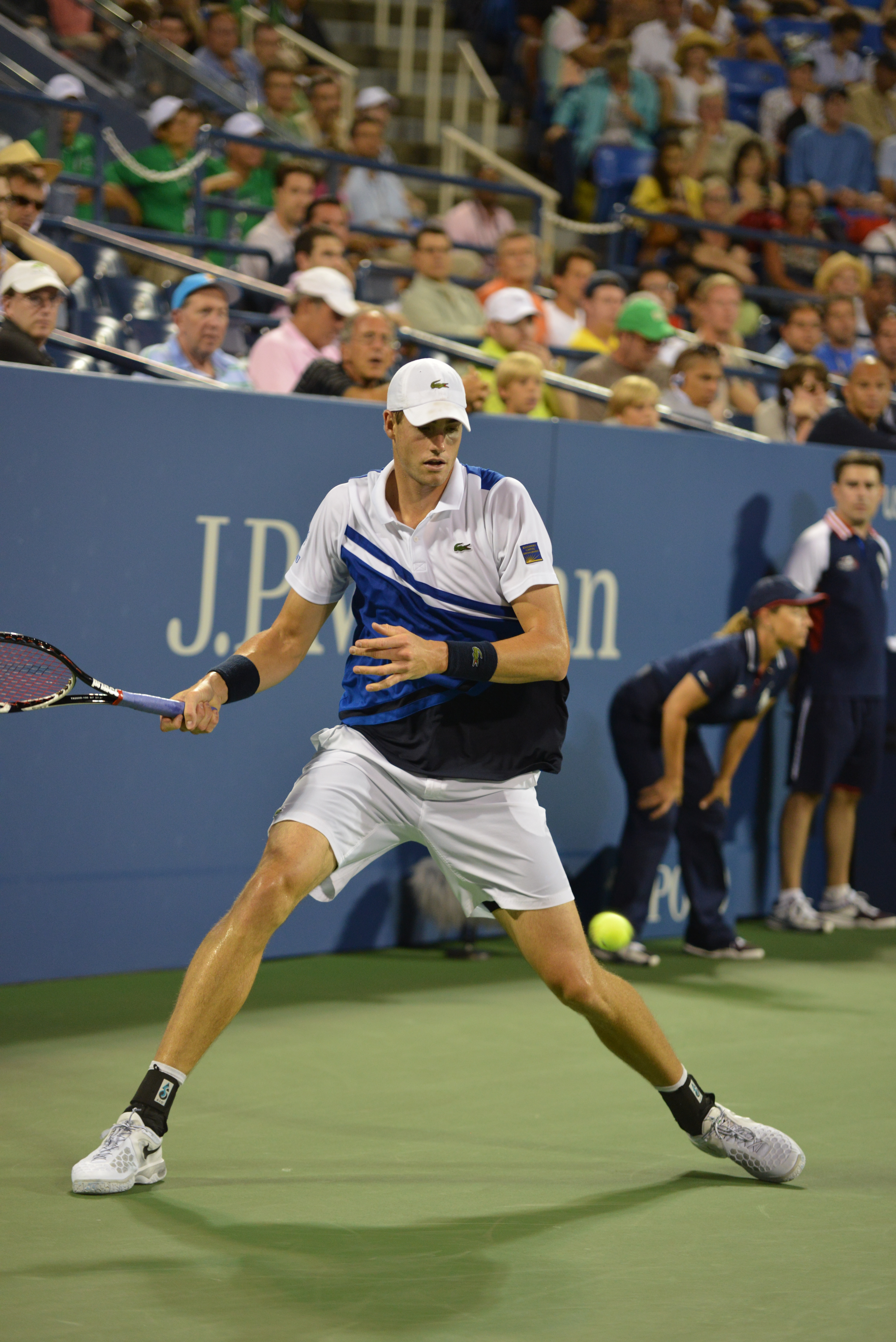 John Isner vs Gael Monfils US Open 2013